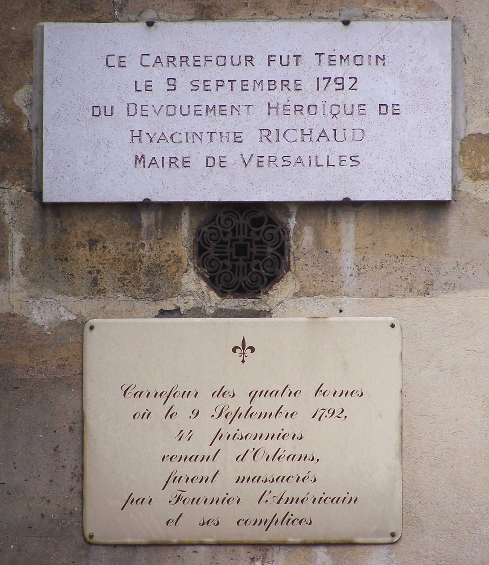 Panneau d'information du carrefour des quatre bornes, aujourd'hui carrefour RD10/RD91 (Leclerc-Orangerie/Satory-Joffre) à Versailles (Yvelines, France)